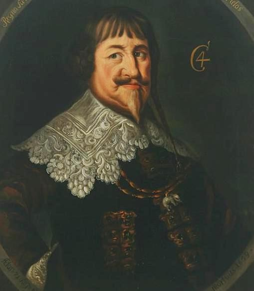 portrait du roi Christian IV